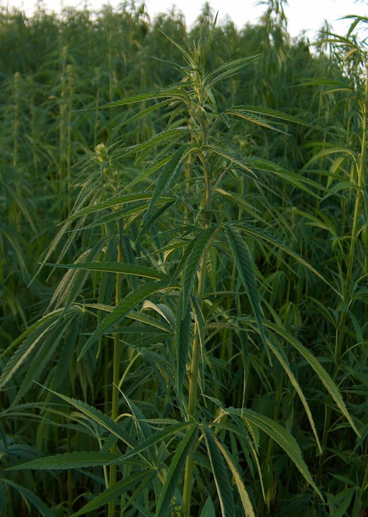 Spitze einer Hanfpflanze auf einem Feld